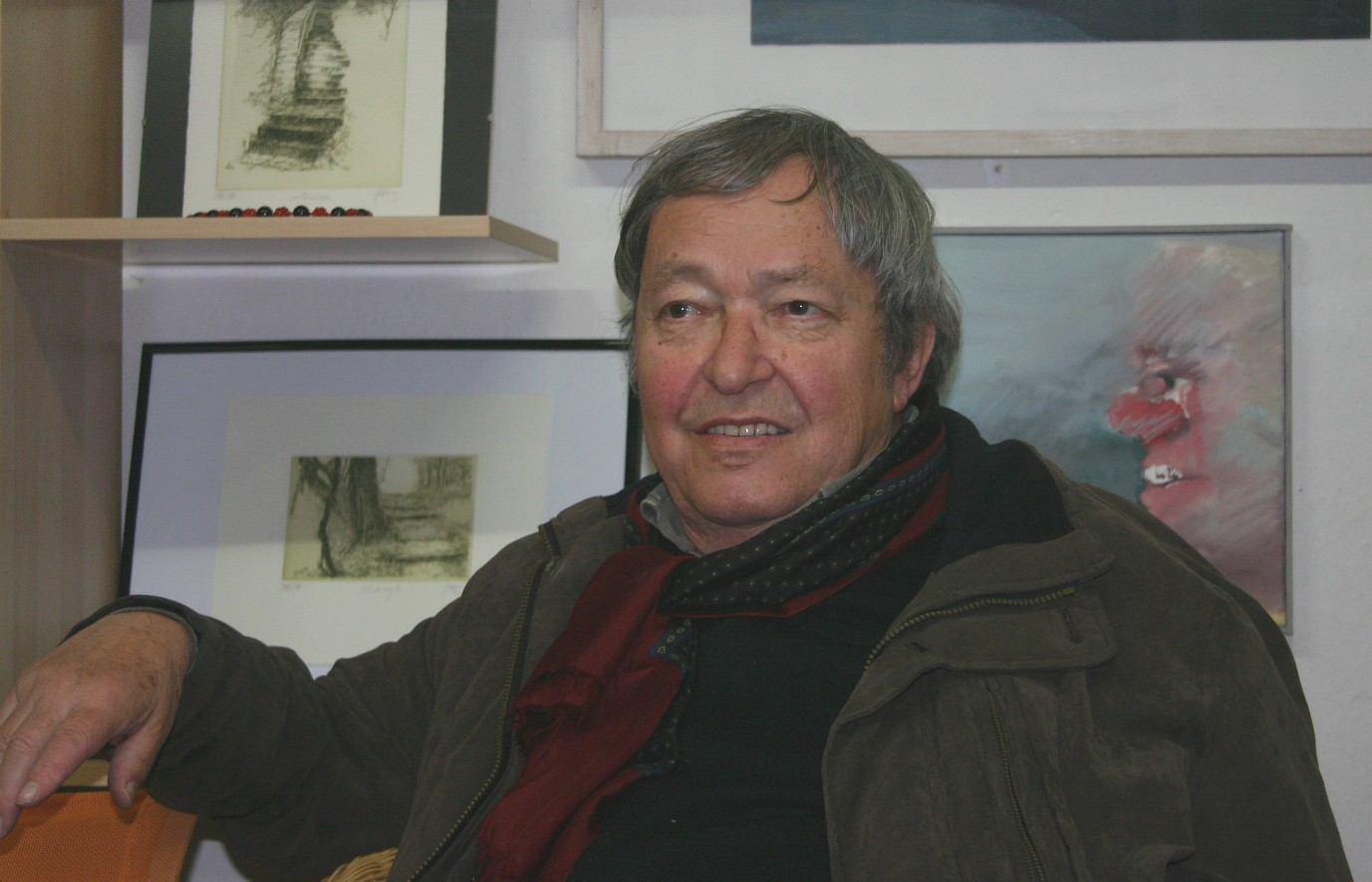 Der Maler Hans Vent im Gespräch. Galerie A, Berlin-Pankow, 26.10.2011